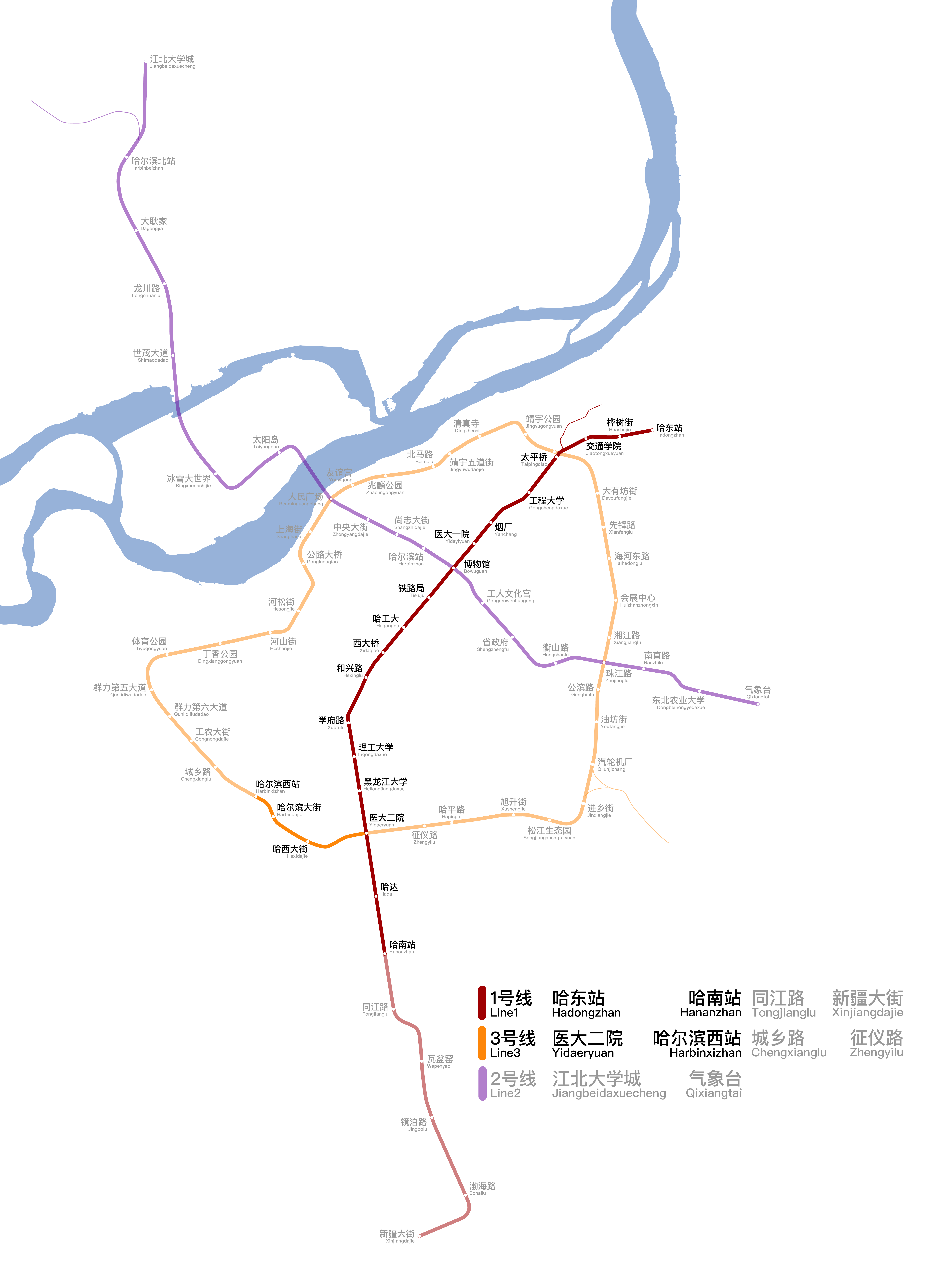 哈尔滨地铁在建线路图，更新于2018年6月